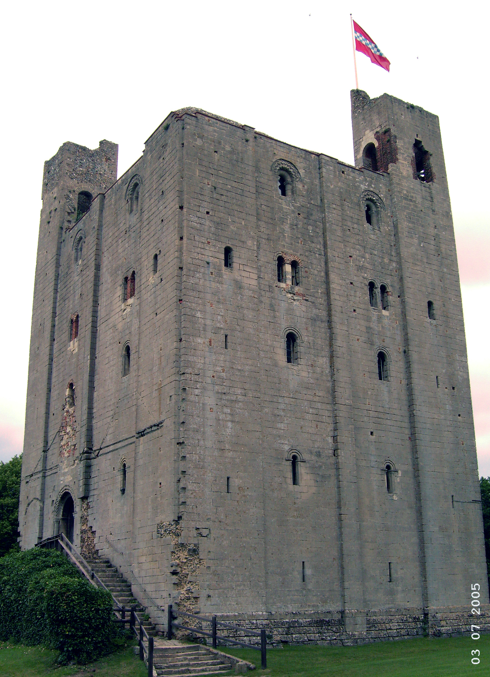 Hedingham Castle, normannische Burg in East Anglia